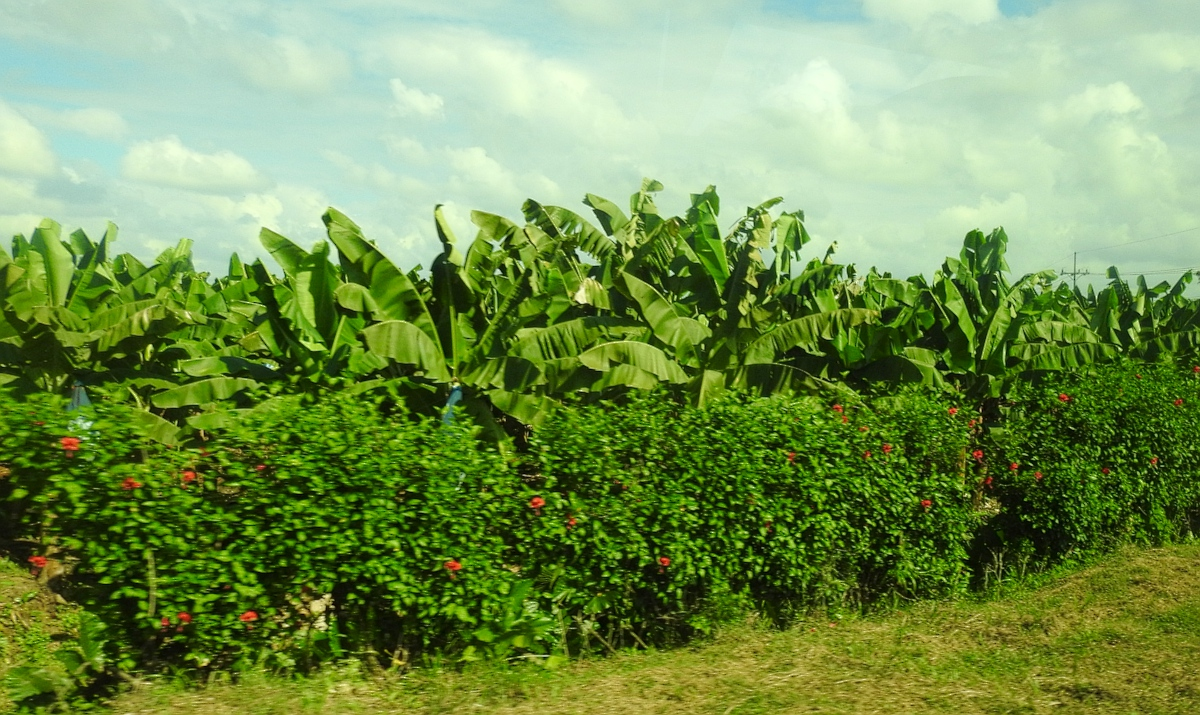 19.DSCN3448-new Costa Rica 2016